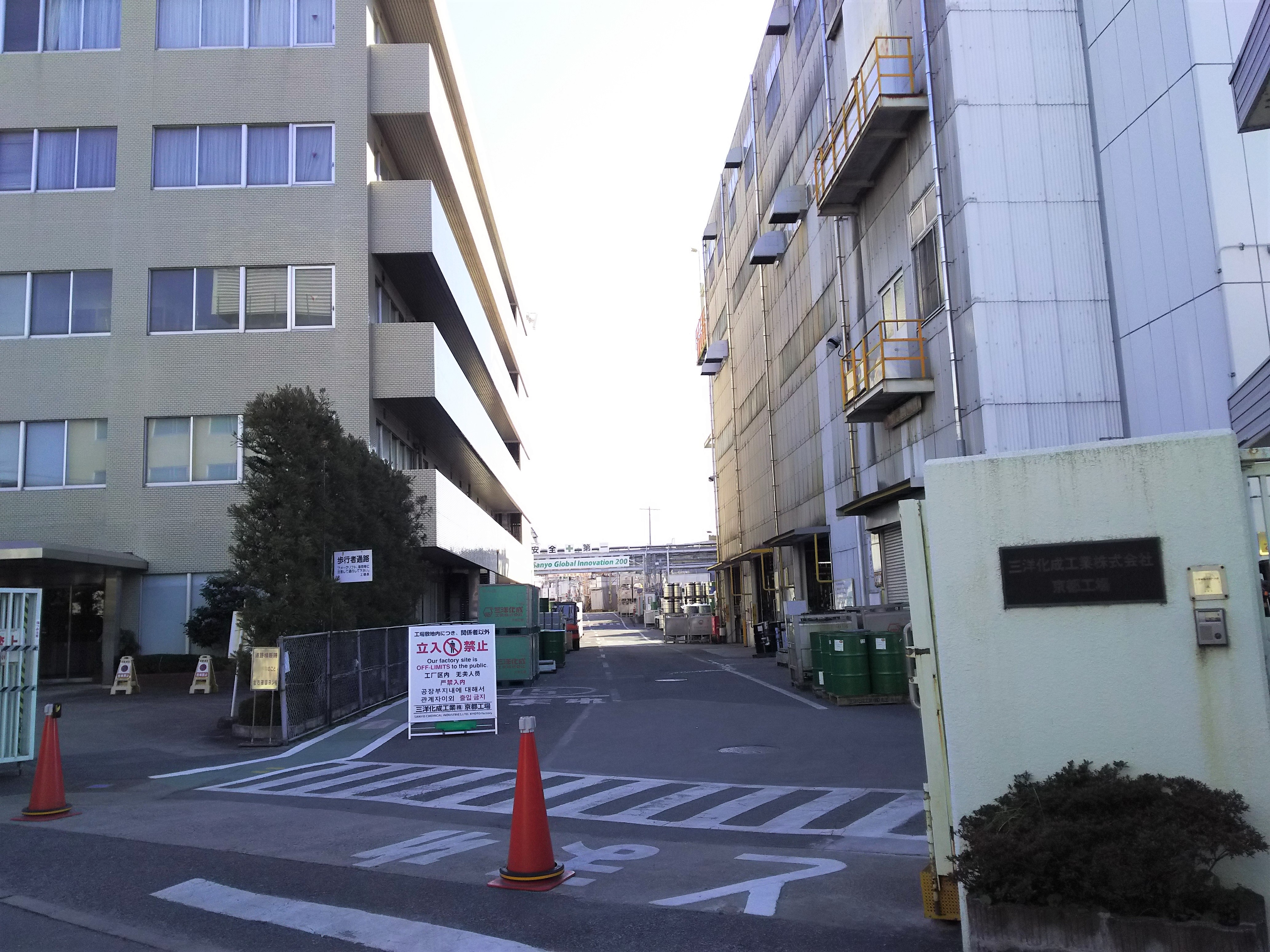 三洋化成工業京都工場入口（京都市東山区）